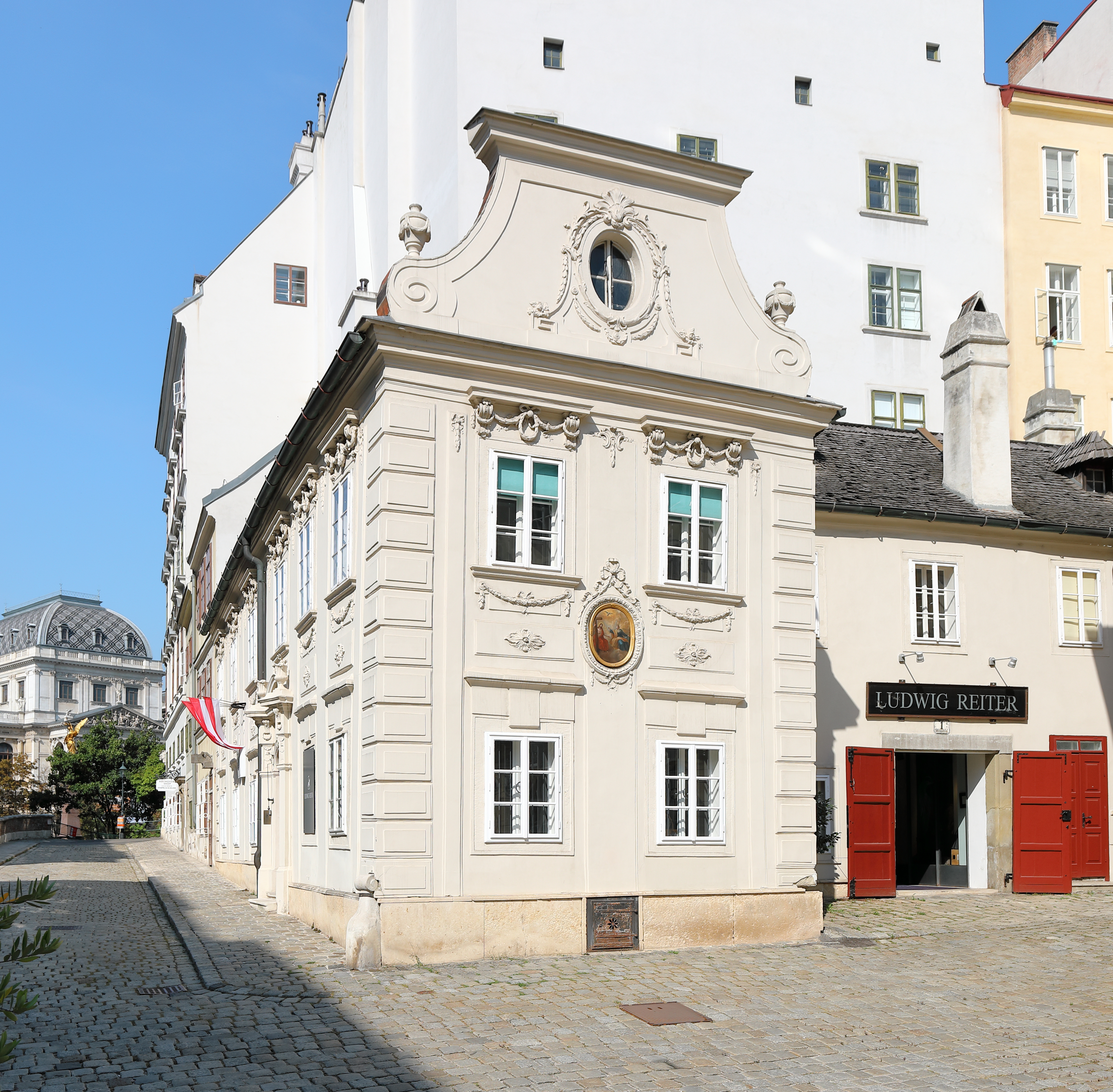 Das sogenannte Dreimäderlhaus an der Adresse Schreyvogelgasse 10 im 1. Wiener Gemeindebezirk Innere Stadt. Links im Hintergrund das Hauptgebäude der Wiener Universität.